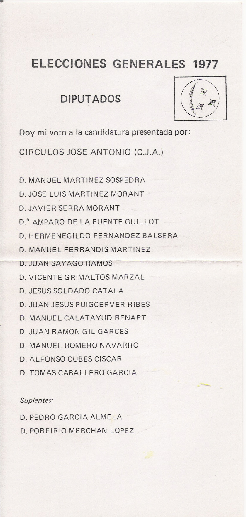 Papeleta electoral al Congreso por Valencia de Círculos José Antonio, de 1977.